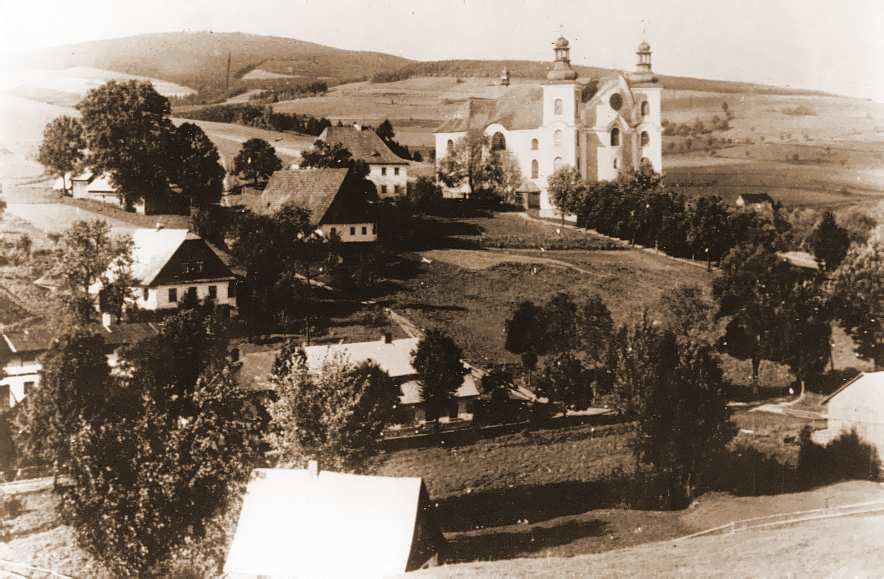 Neratov v Orlických horách, kostel Nanebevzetí Panny Marie.